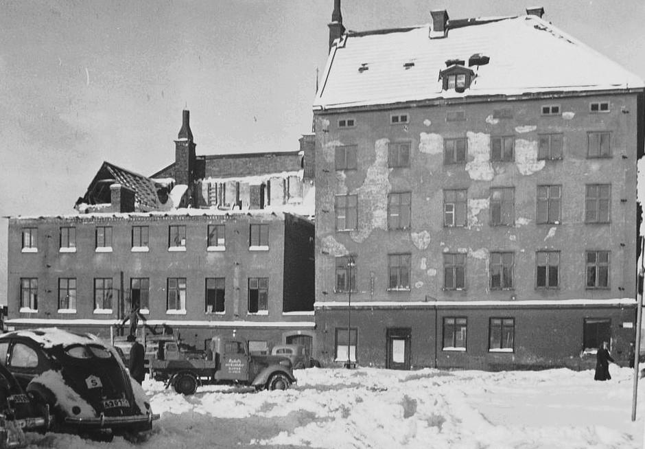 Kvarteret Icarus mot Mälartoget under rivningen